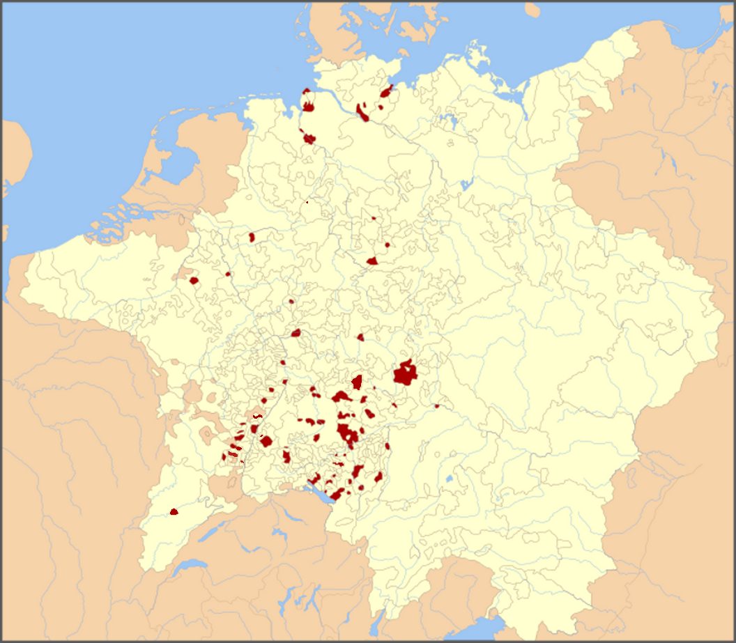 I territori imperiali (libere città imperiali) nell'ambito del Sacro Romano Impero nel 1648 (mappa precedente emendata di alcuni errori)